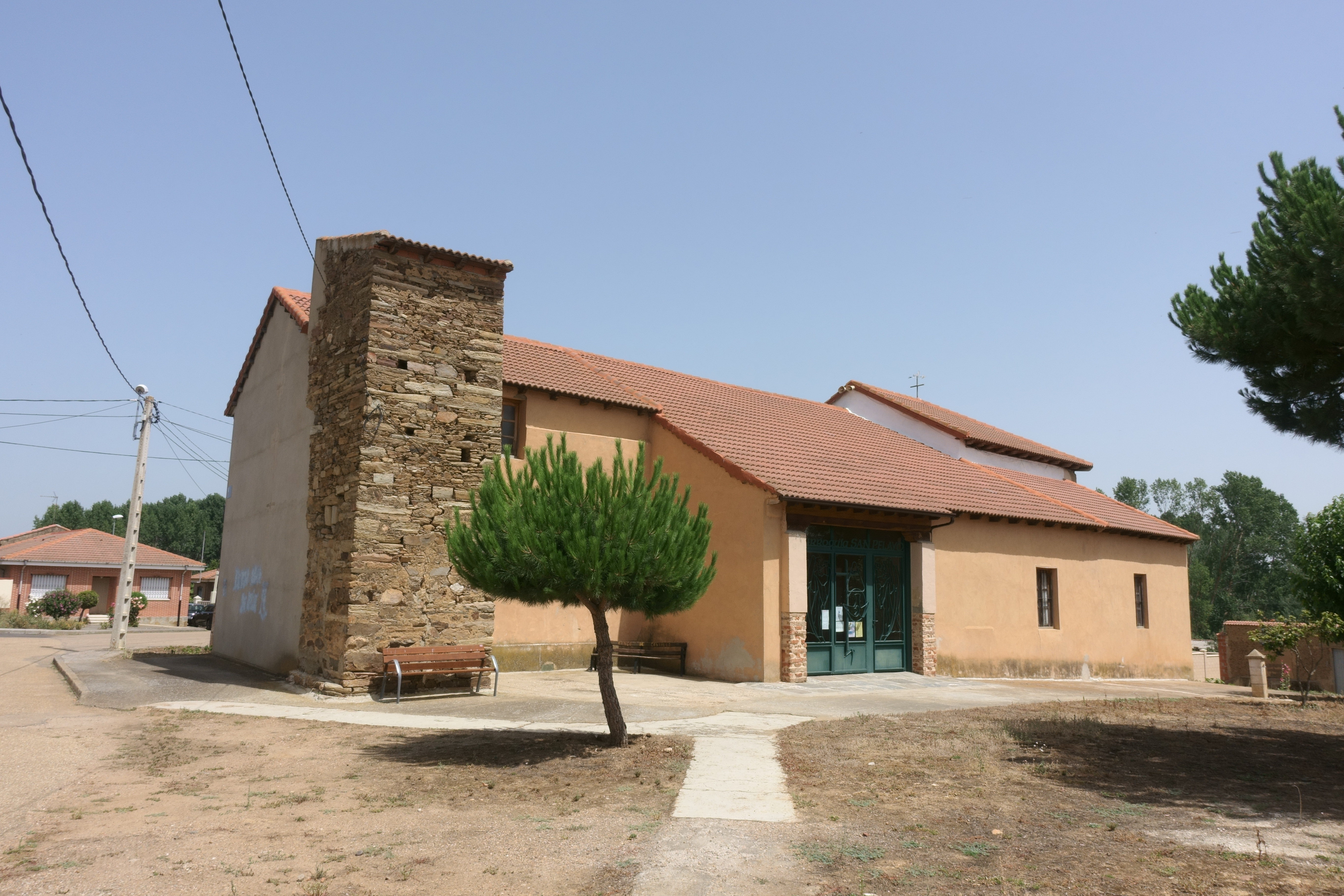 Iglesia de San Pelayo, en Pozuelo del Páramo (León, España).